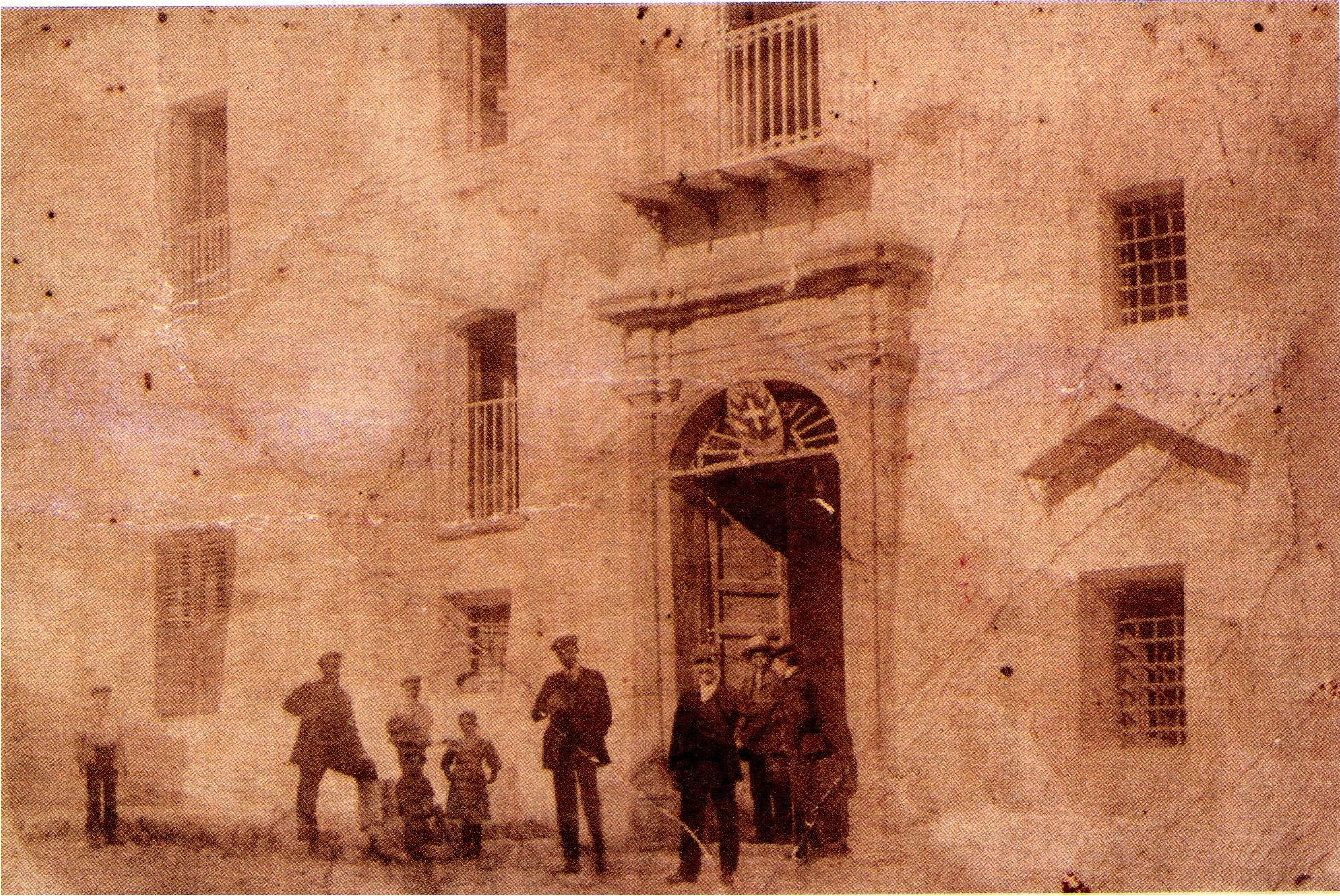 Palazzo Ducale nei primi del '900